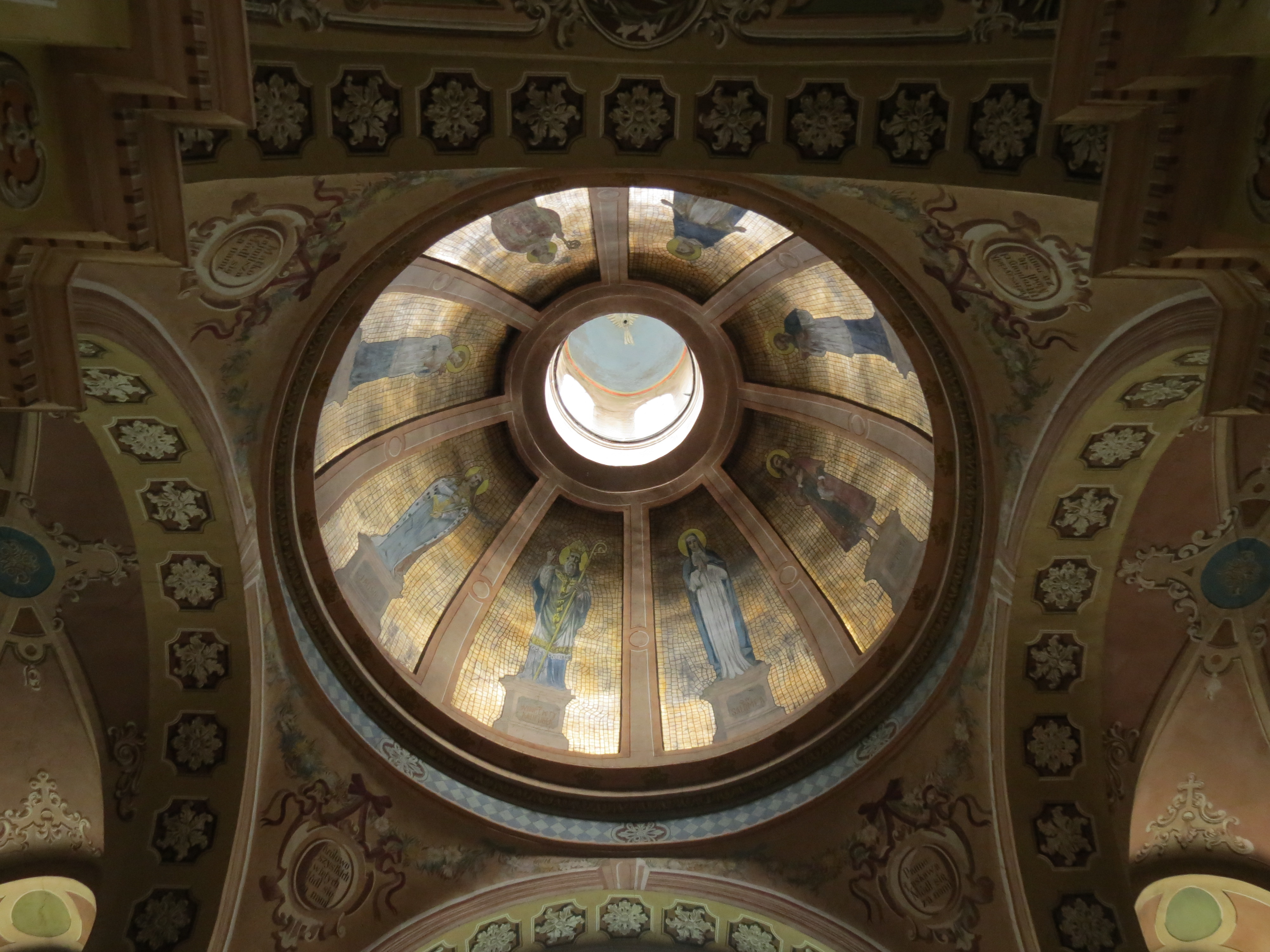 Jarosław, kościół p.w. św. Jana Chrzciciela, ob. par. p.w. Bożego Ciała, 1572, XVIII, 1890